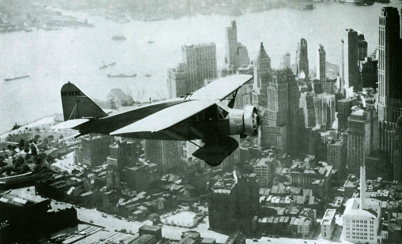 Литуаника над Нью-Йорком